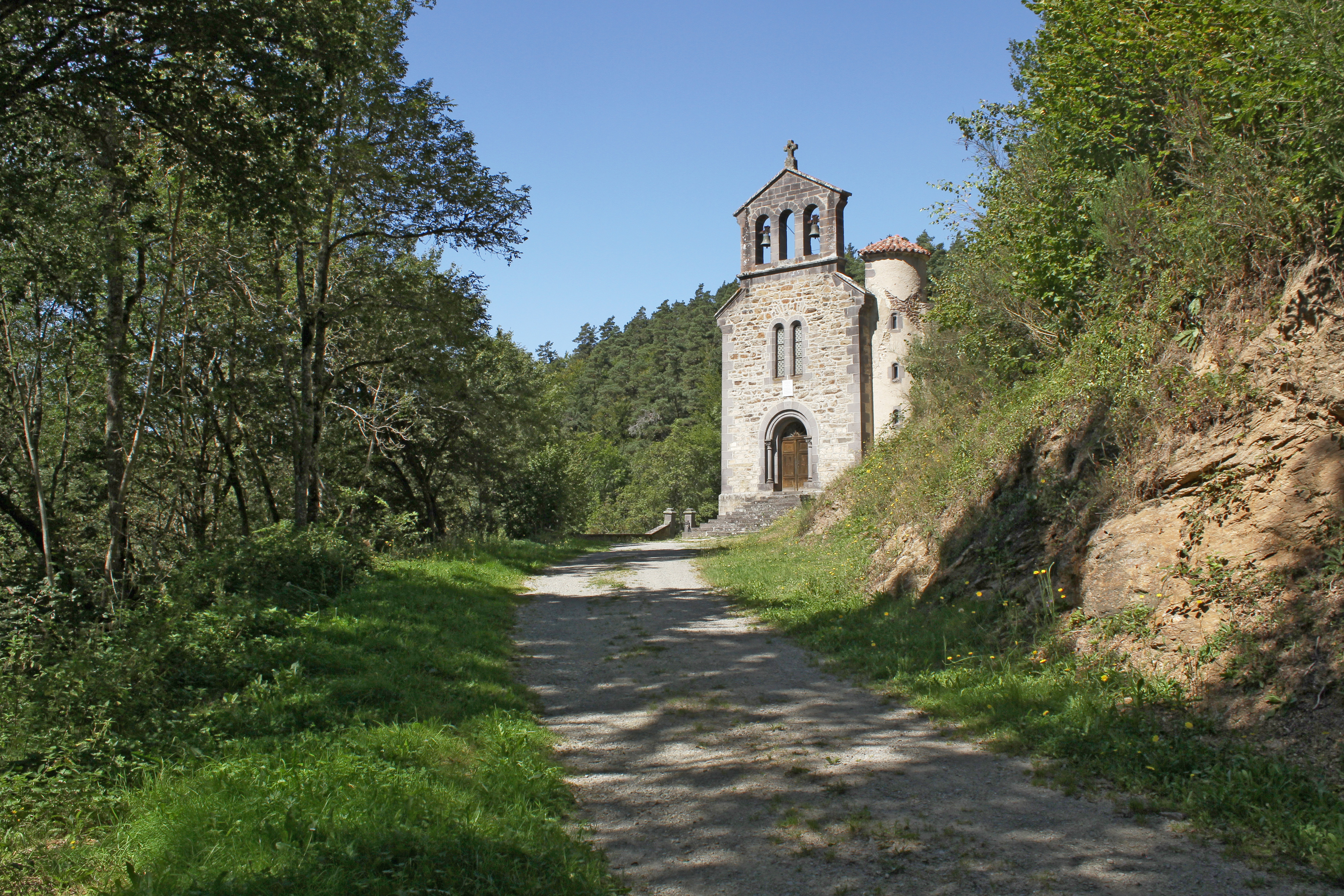 Église Saint-Clair de Montclard